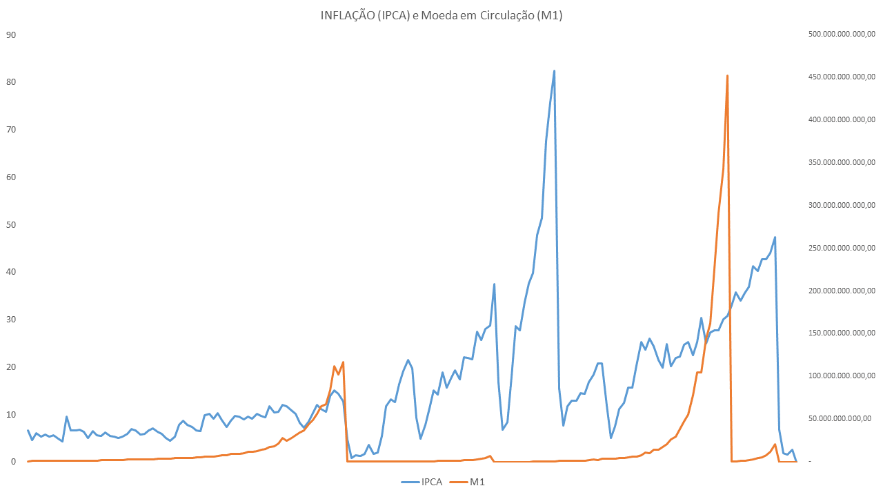 Índice de preços ao consumidor (IPCA) e Agregado Monetário M1 (Papel-Moeda em poder publico + Depósitos a Vista)